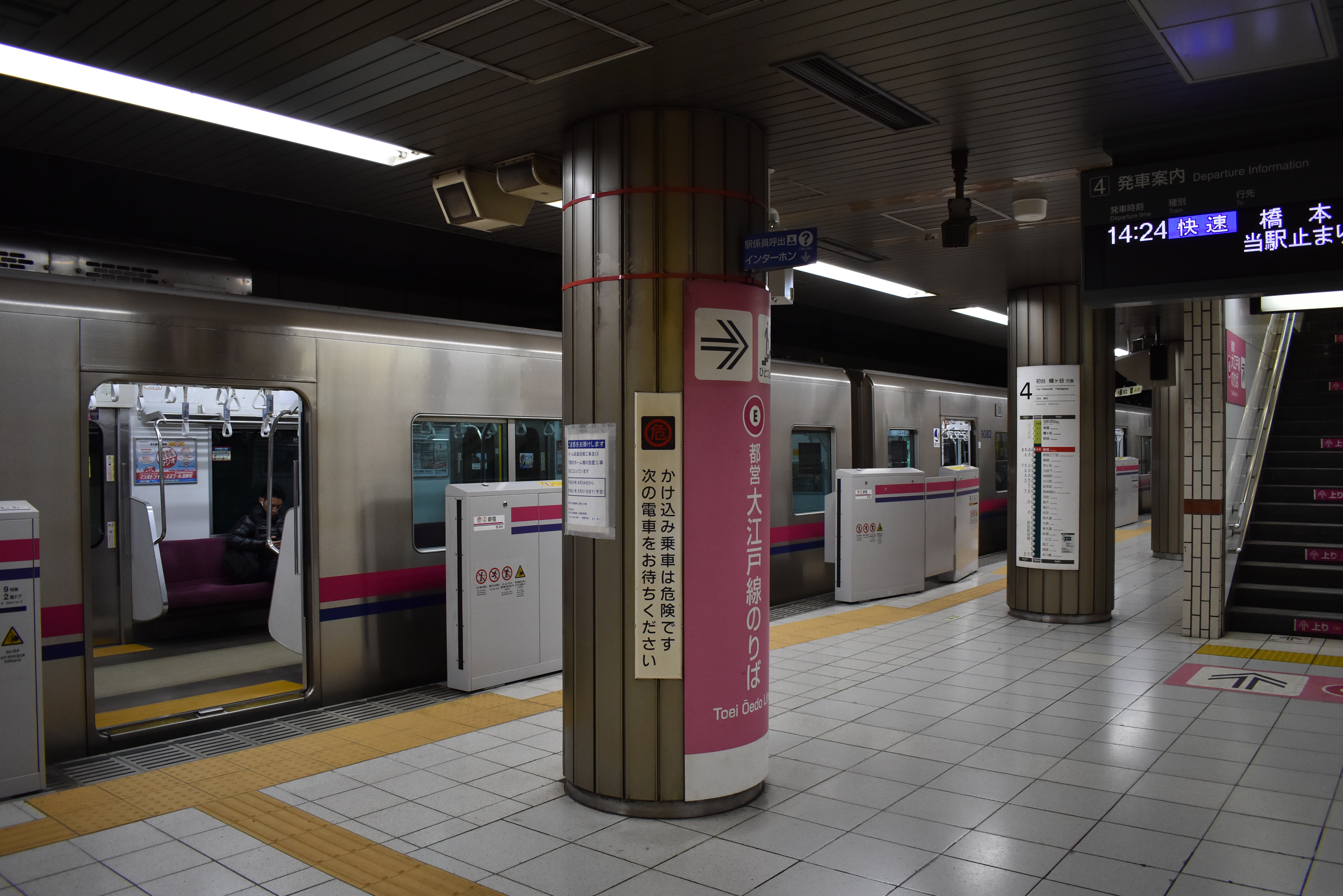 都営新宿線 新宿駅